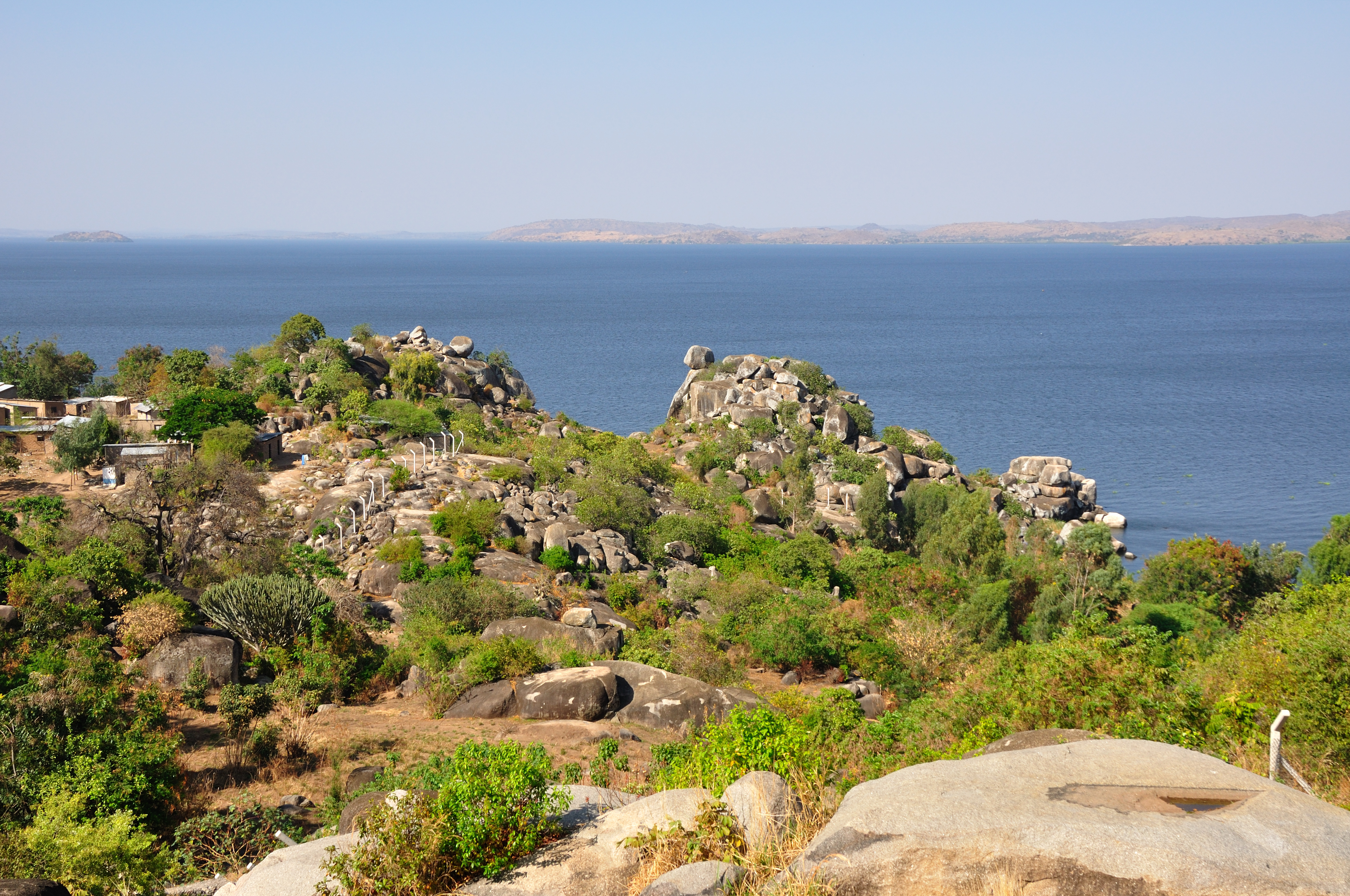 Tanzania, views in Mwanza